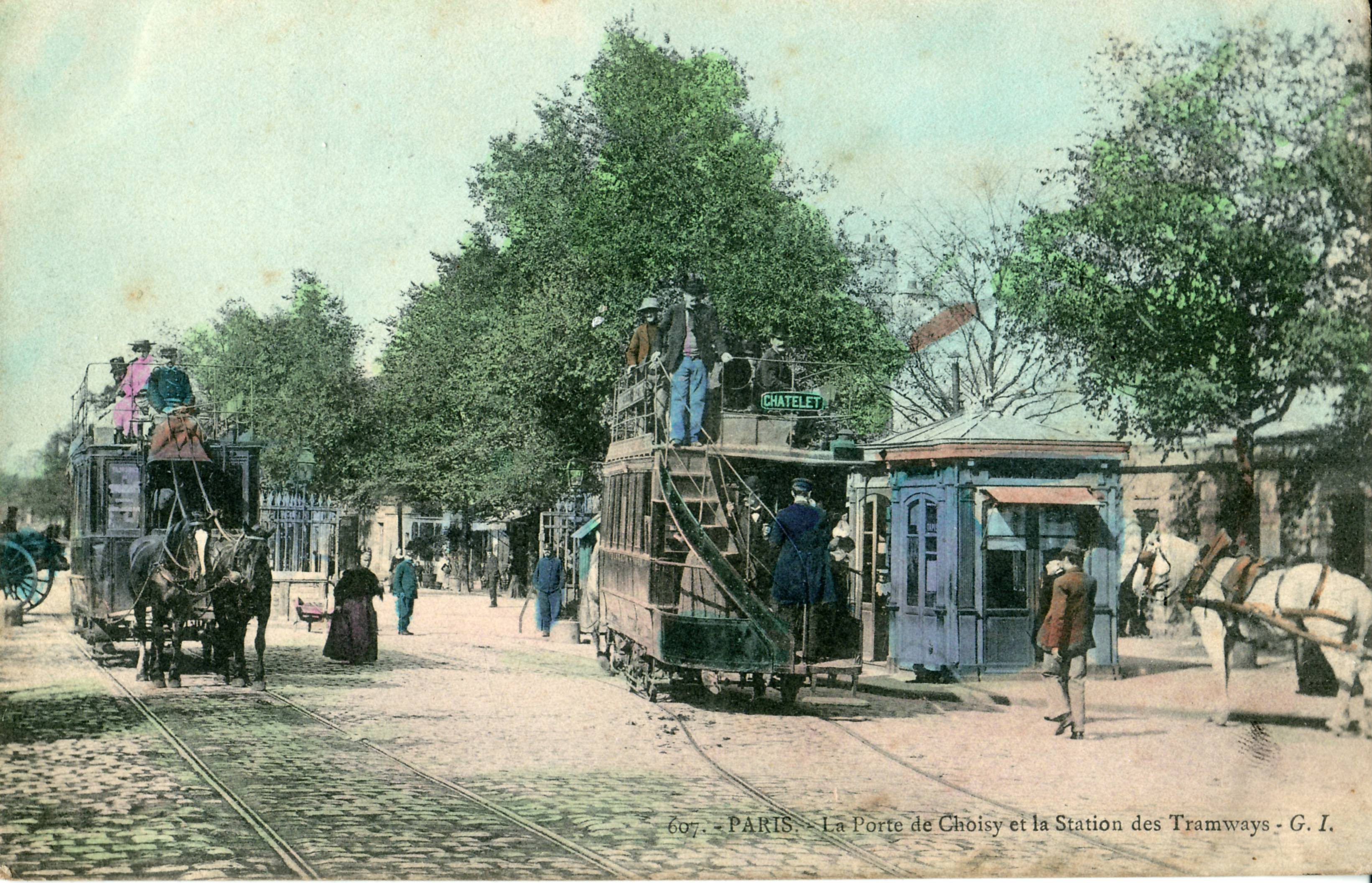 Carte postale ancienne éditée par GI, N°607 Paris : La Porte de Choisy et la Station des Tramways Tramways hypomobiles. L'autre terminus était Place du Châtelet.